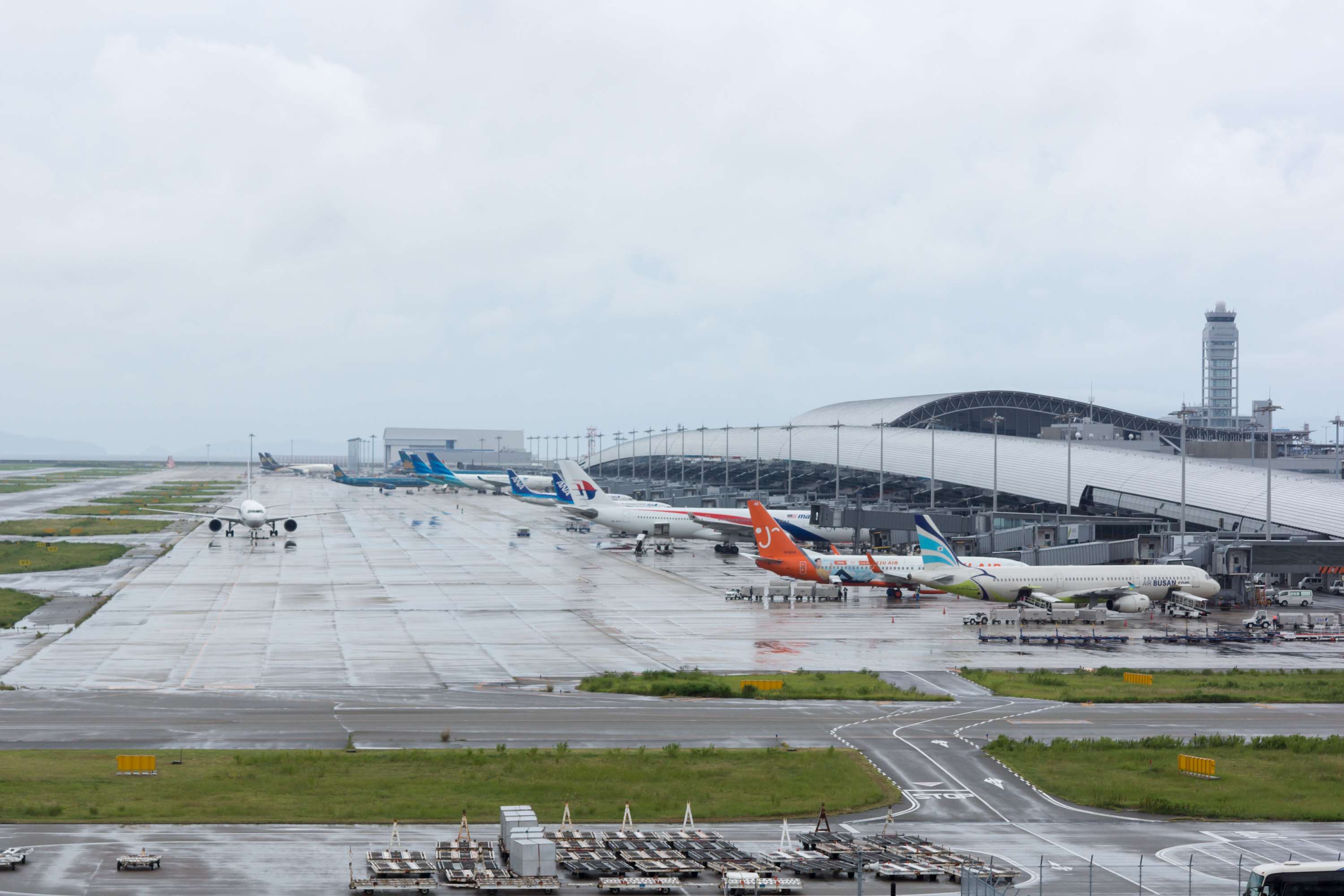 関西空港第1ターミナル